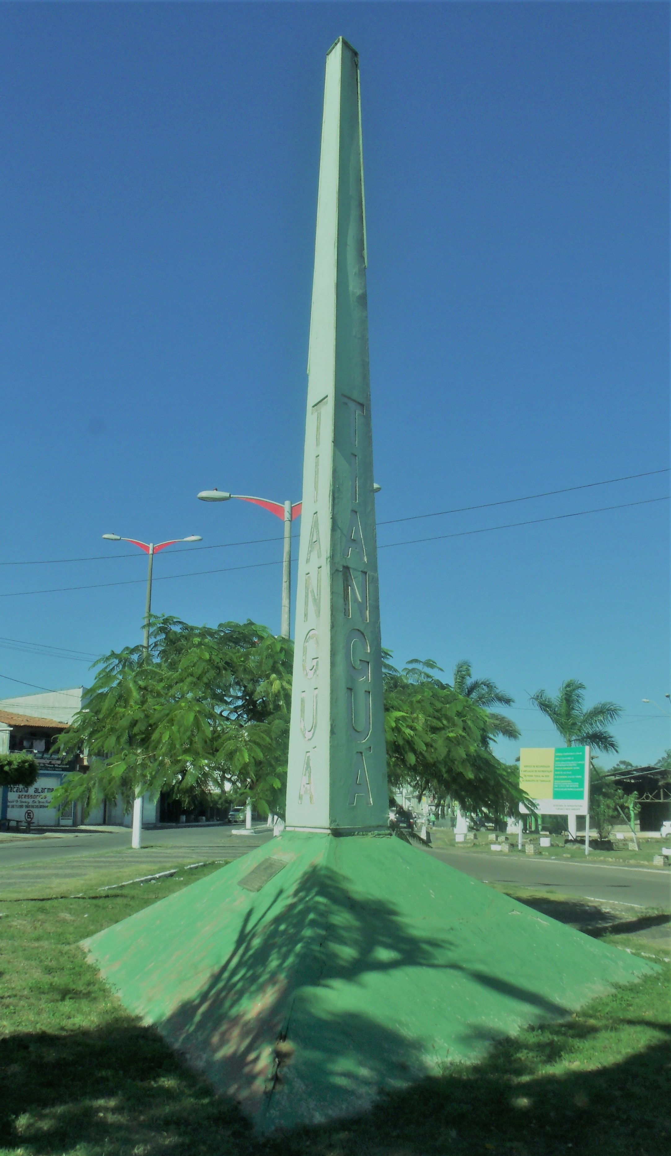 Obelisco de Tianguá construído na praça do Almirante como marco da rodovia CE que liga Tianguá a Ubajara.